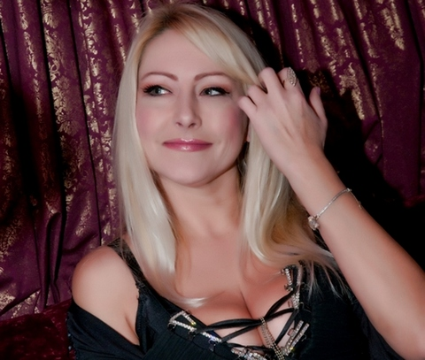 Хеллоуинн в "Seven"